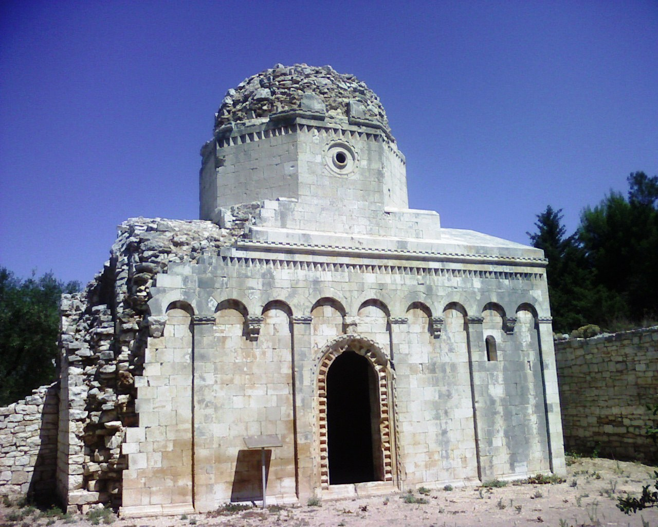 chiesa di san felice in balsignano - Modugno (bari)-Italy